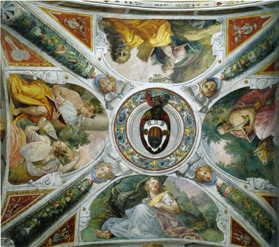 Pablo de Céspedes, Decorazione della volta, 1570 c., trinità dei monti